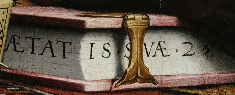 Holbein Ambassadeurs detail age Selve